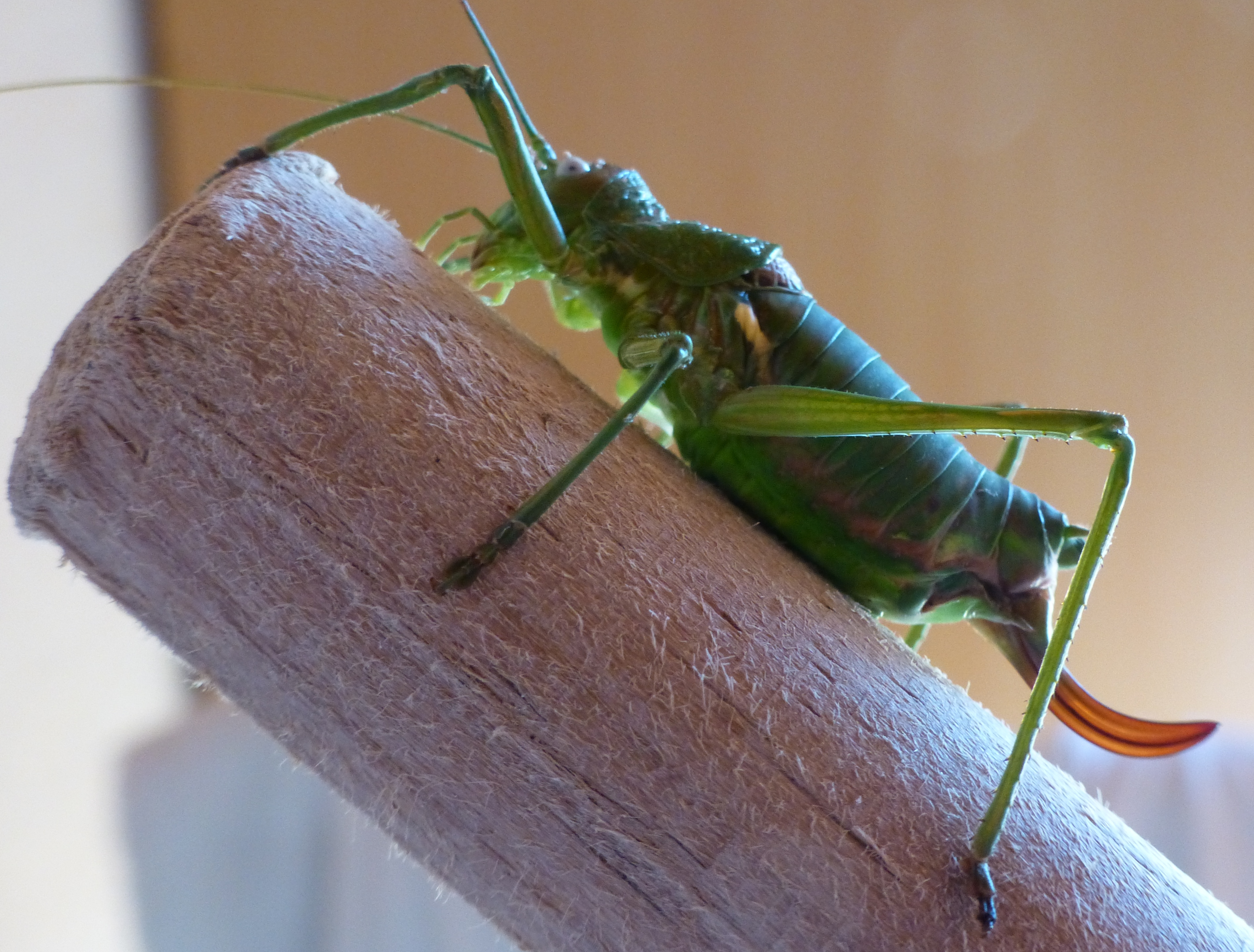 Sauterelle Uromenus rugosicollis femelle vue de profil (île d'Oléron, France)